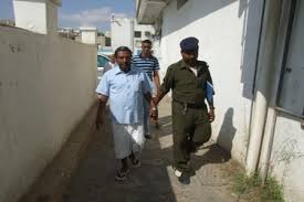 صورة توضح اعتقال باعوم ومحاكمتة العام 2007م